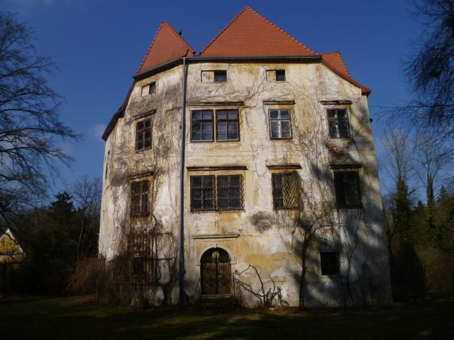 Schloss Dietach heute